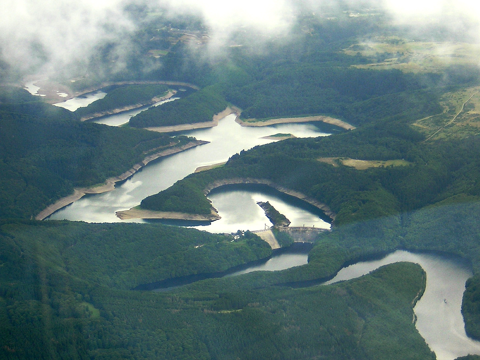 Urfttalsperre, unterhalb der Staumauer der frühere Verlauf der Urft, jetzt überstaut durch den Obersee der Rur.